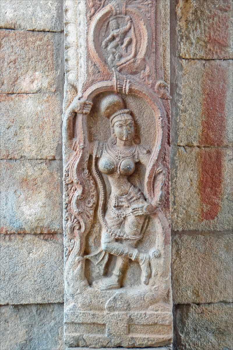 A yakshi at Hindu temple in Hampi Yaksha (Sanskrit: यक्ष yakṣa) is the name of a broad class of nature-spirits, usually benevolent, who are caretakers of the treasures created by the benevolence of nature, some open, some hidden in the earth and tree roots. They appear in Hindu, Jain and Buddhist literature. The feminine form of the word is yakṣī (यक्षी), yakshi or yakshini (yakṣiṇī, यक्षिणी). In Hinduism, the yakṣi is a nature-fairy, that often protects the weak, nourishes the distressed, and grants favors of strength and perseverance. Décor avec une yakshi sur un des murs du temple de Vitthala à Hampi (Vijayanagar). Une yakshi est une nymphe (ou un esprit de la Nature) qui tient la branche d'un arbre couvert de fruits. Ce motif - la femme qui touche l'arbre porteur de fleurs ou de fruits - a traversé les siècles de l'art indien jusqu'à aujourd'hui Vitthala ou Vithoba était à l'origine un dieu local du bétail, il a été au cours du temps assimilé à Krishna, un des avatars de Vishnou, lui aussi dieu du bétail. Le temple de Vitthala est dédié à Vishnou, son grand mandapa a été réalisée vers 1550. C'est l'une des dernières grandes réalisations du royaume de Vijayanagar avant sa destruction en 1565 par la coalition de cinq armées musulmanes des émirats du nord de l'Inde. Avec ses 56 piliers finement sculptés, ornés de colonnettes et un plafond richement décoré, cette salle est considérée comme l'un des chefs-d'oeuvre de l'art de Vijayanagar, dont le style est imprégné exclusivement des traditions artistiques de toute l'Inde du sud. Site officiel=